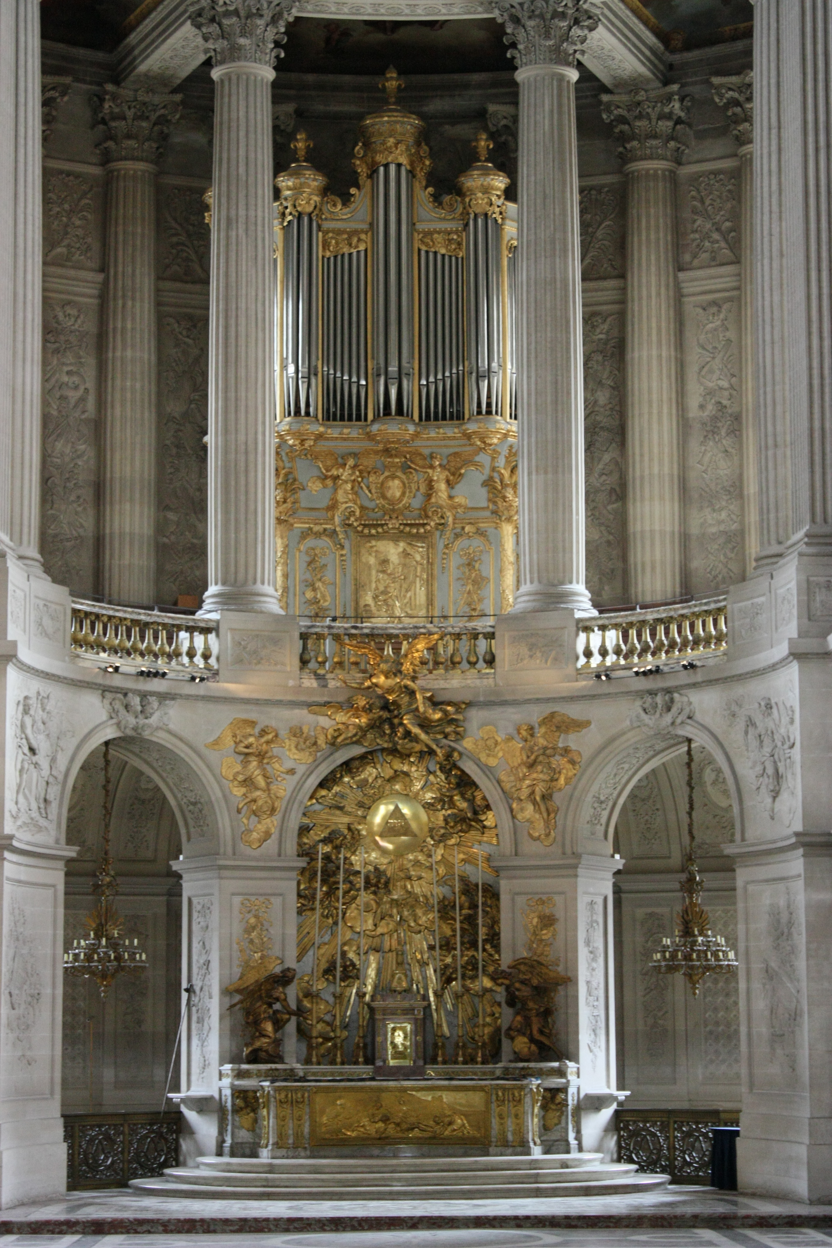 Die Schlosskapelle des Schloss Versailles in Paris, Frankreich.